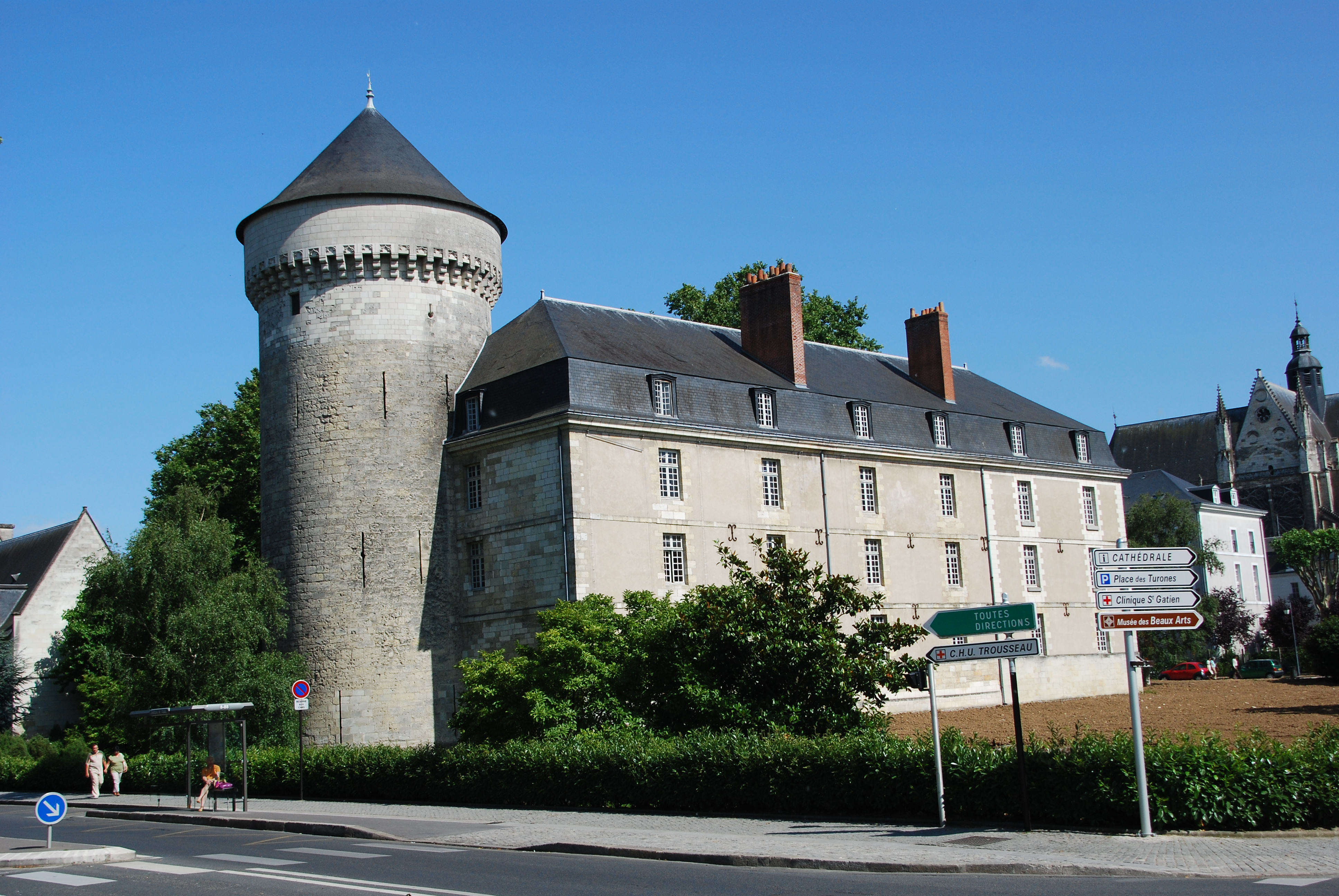 Château de Tours, Tours, Indre-et-Loire, France